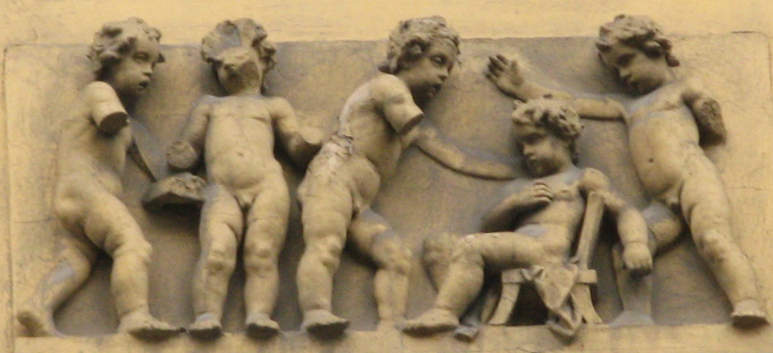 Putten von Matscheko und Schrödl (1898), Wiedner Hauptstraße 14, Wien-Wieden